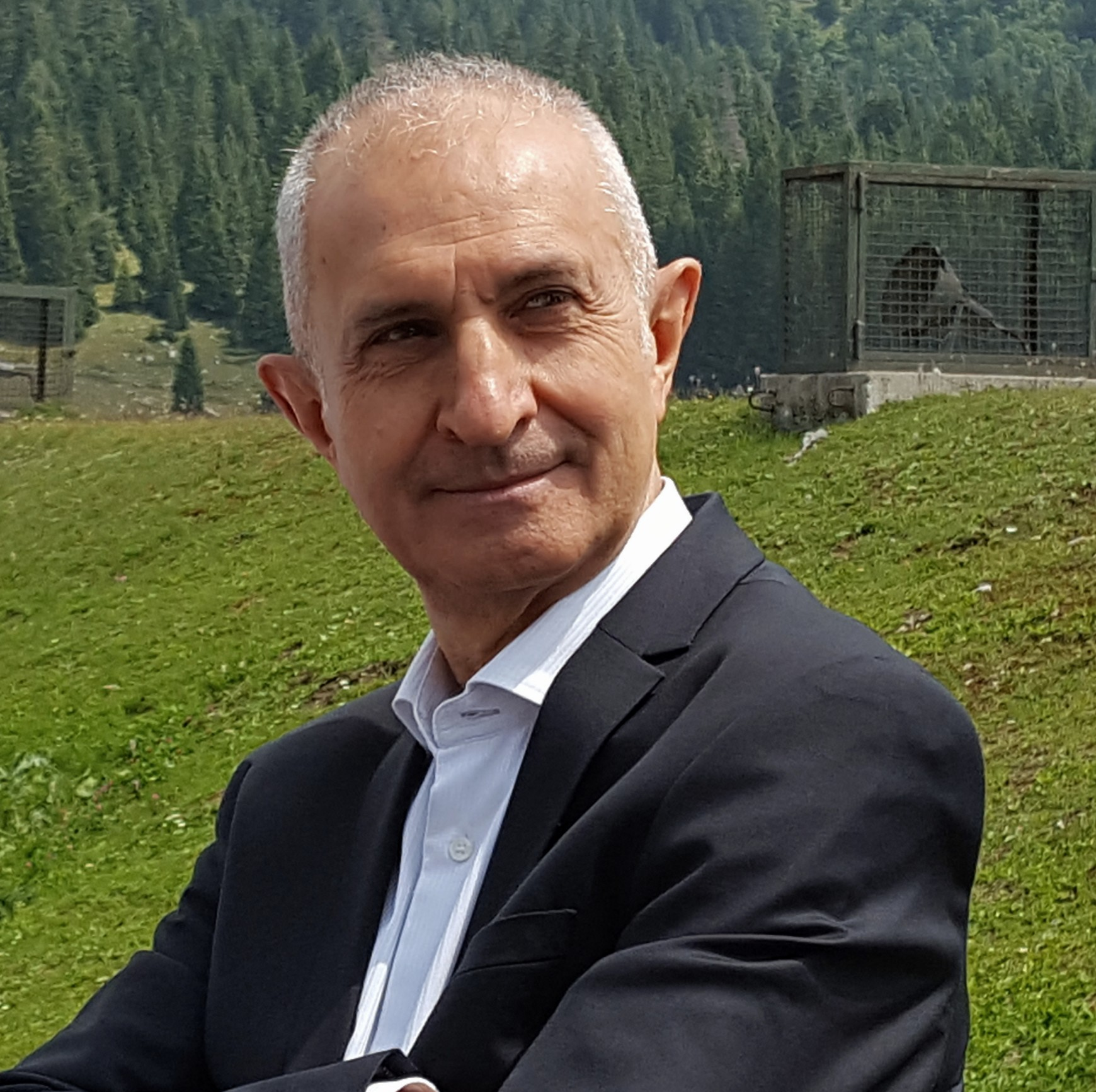 In visita alla Base Tuono di Folgaria